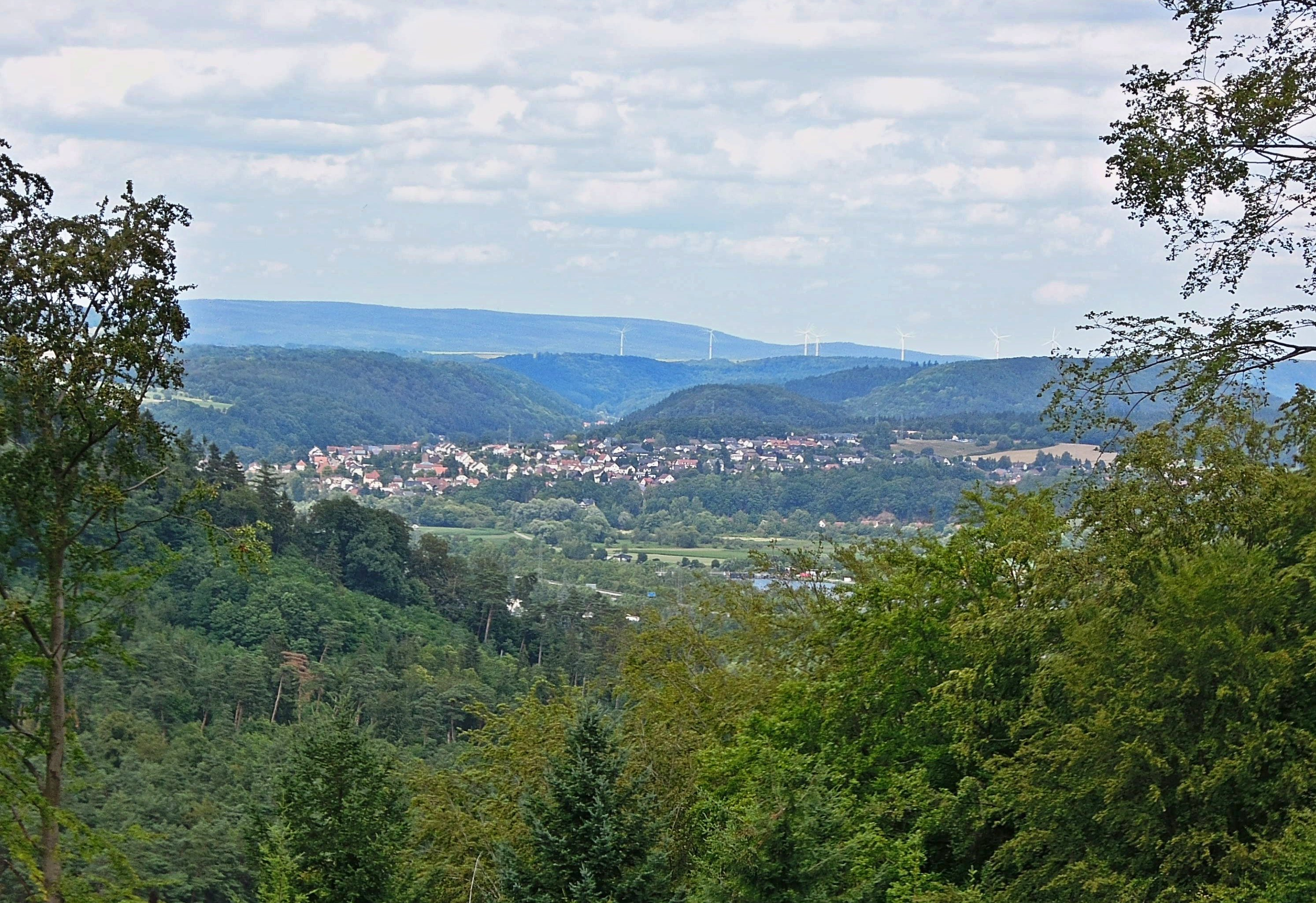 Blicke auf Beckingen vom Oberlimberg